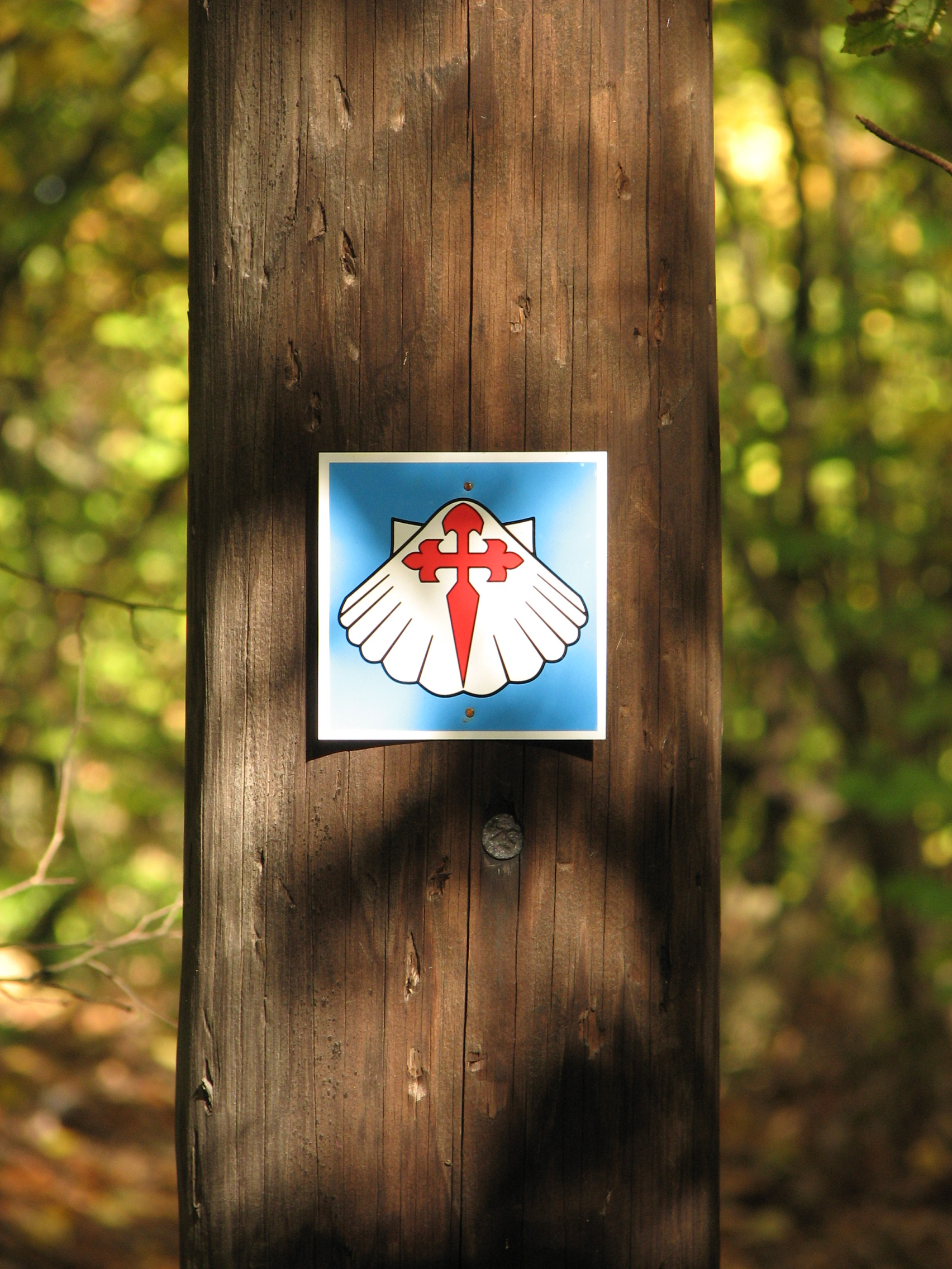 oznakowanie w terenie Wielkopolskiej Drogi św. Jakuba